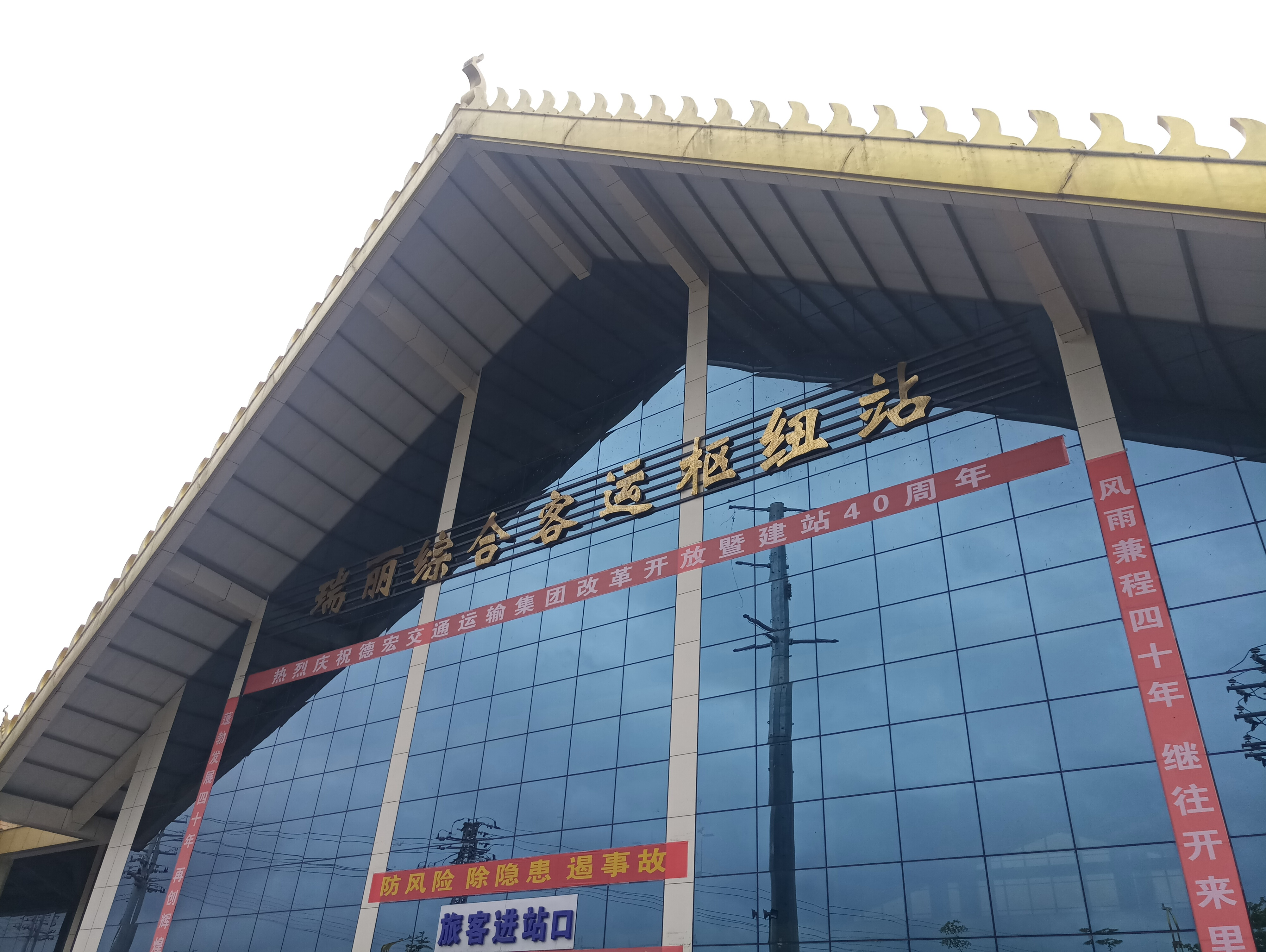 中文（中国大陆）: 瑞丽综合客运枢纽站